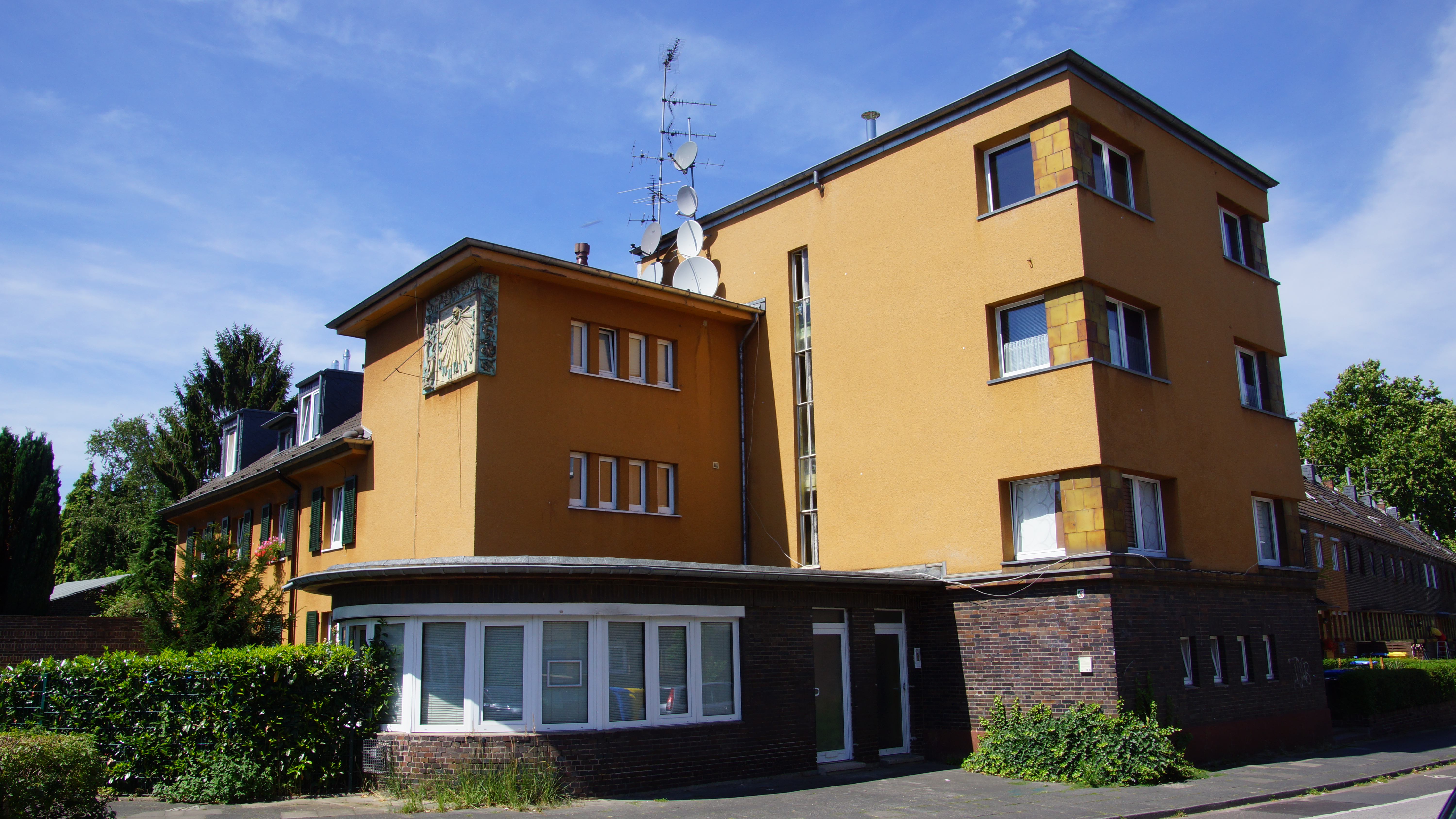 Baudenkmal Wohnhaus Frechen, Keimesstr. 24, Gem. Frechen, Flur 4, Parz. 846/111 This is a photograph of an architectural monument. 37